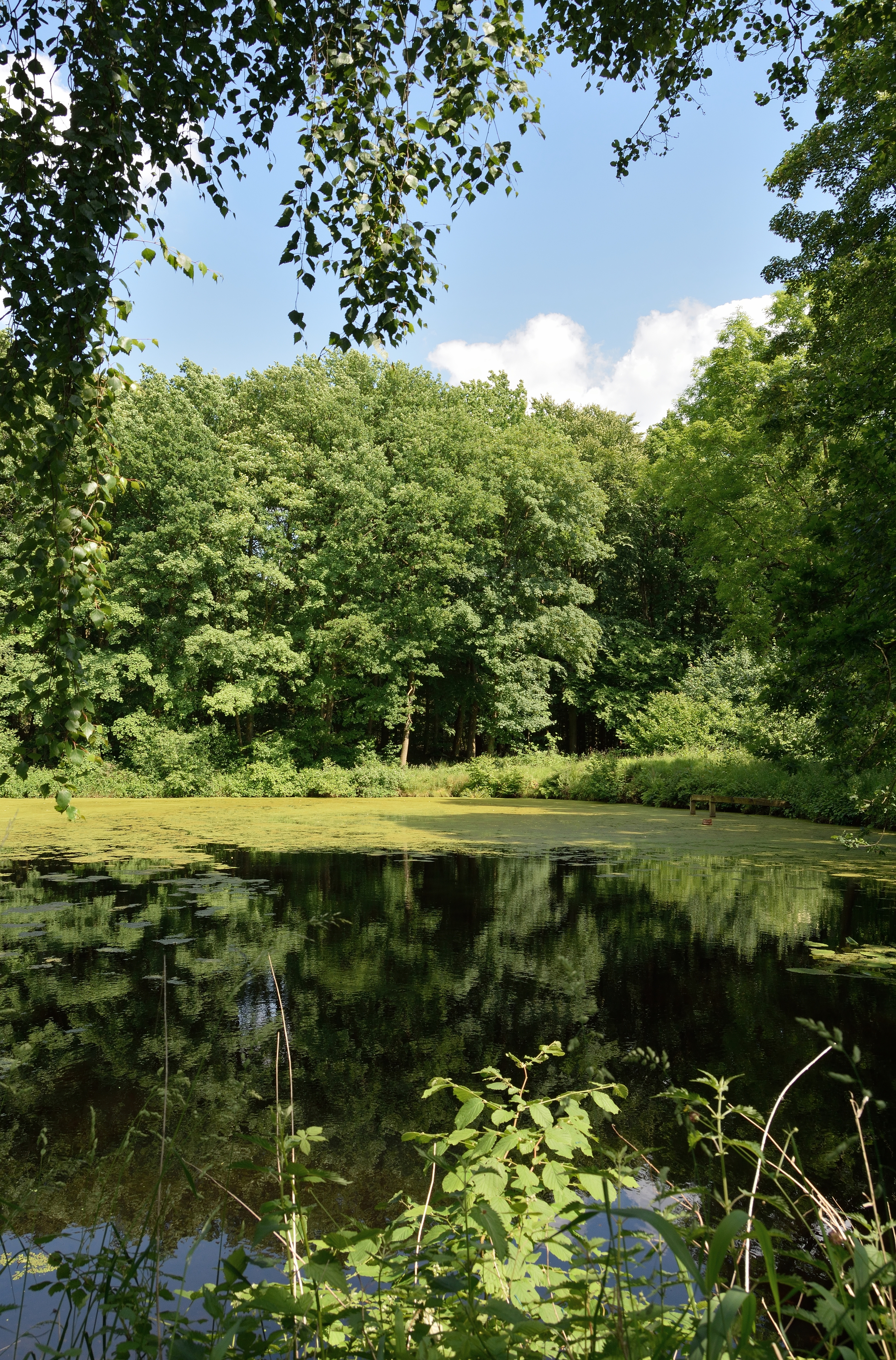 Der Kreis Steinburg hat mehrere Flächen unter dem gemeinsamen Namen "Landschaftsbestandteile und Landschaftsteile im Bereich mehrerer Gemeinden" zusammengefasst. Dieses Foto wurde in der Waldfläche „Heiligenstedtener Holz“ in Heiligenstedten aufgenommen, es ist das Teilstück Nr. 2.